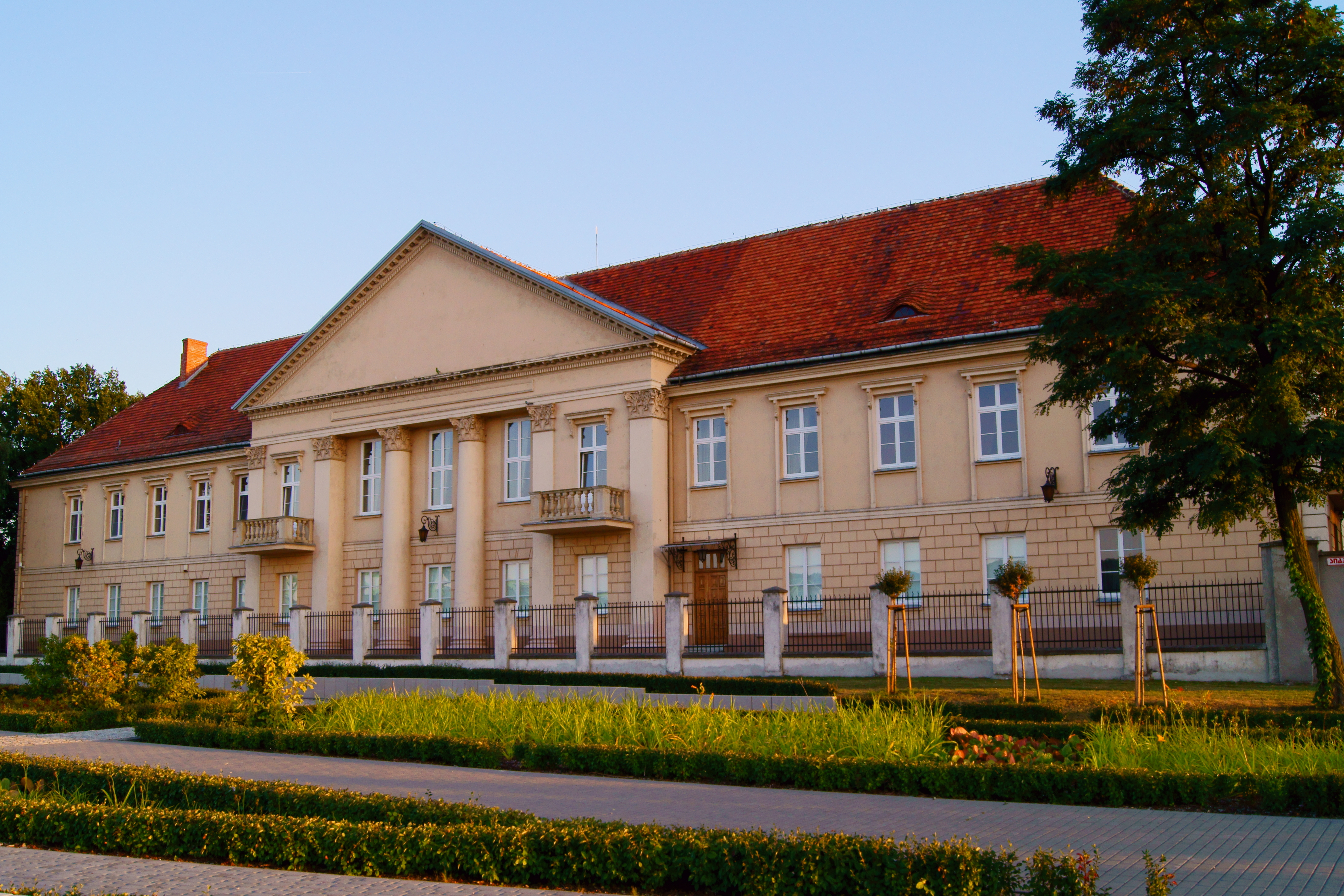 pałac biskupi, 1 poł. XIV, 1720-1738, 1925 Włocławek, ul. Gdańska 2/4 widok od strony bulwarów